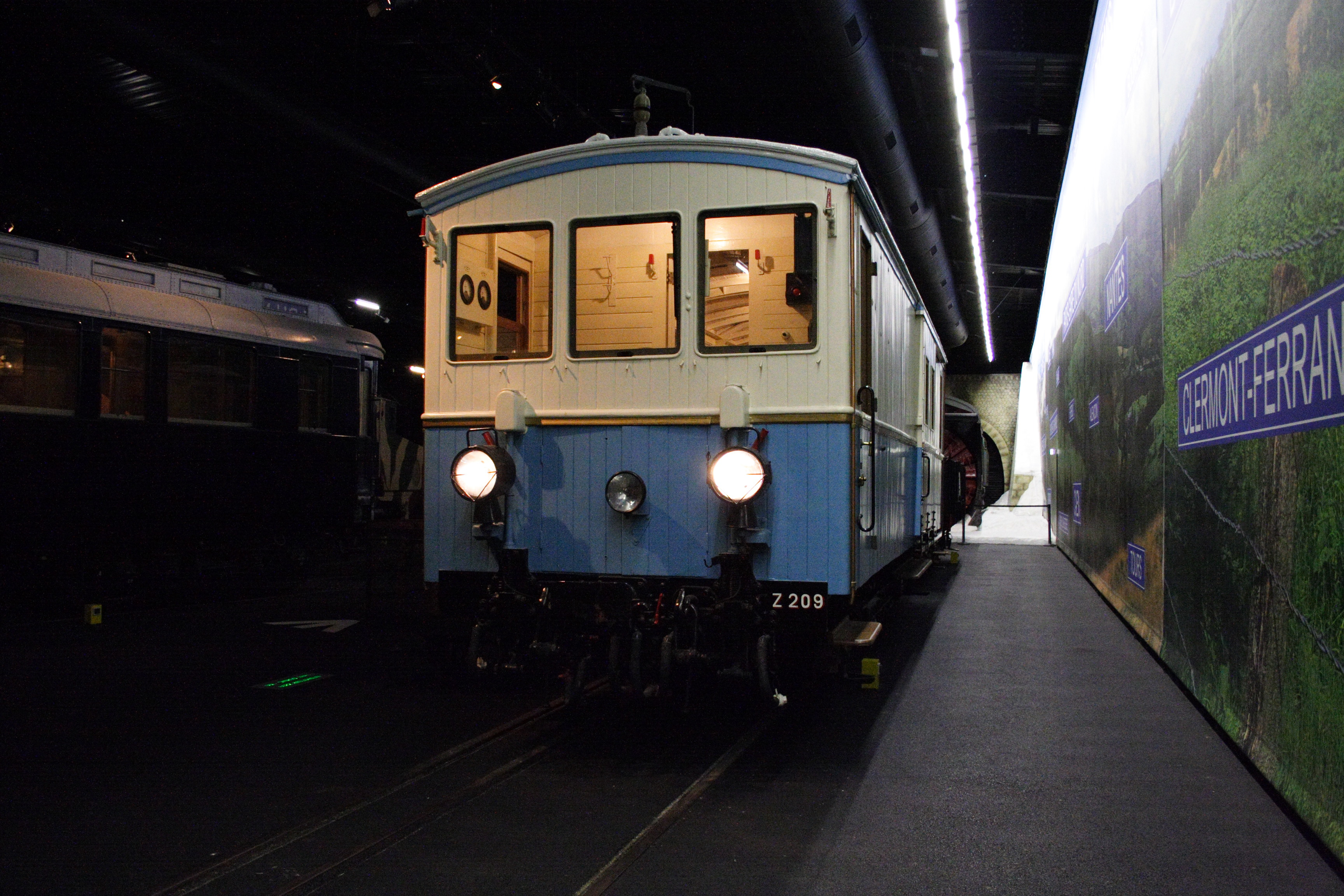 an autorail Z209 at Cité du Train de Mulhouse(Mulhouse, France)